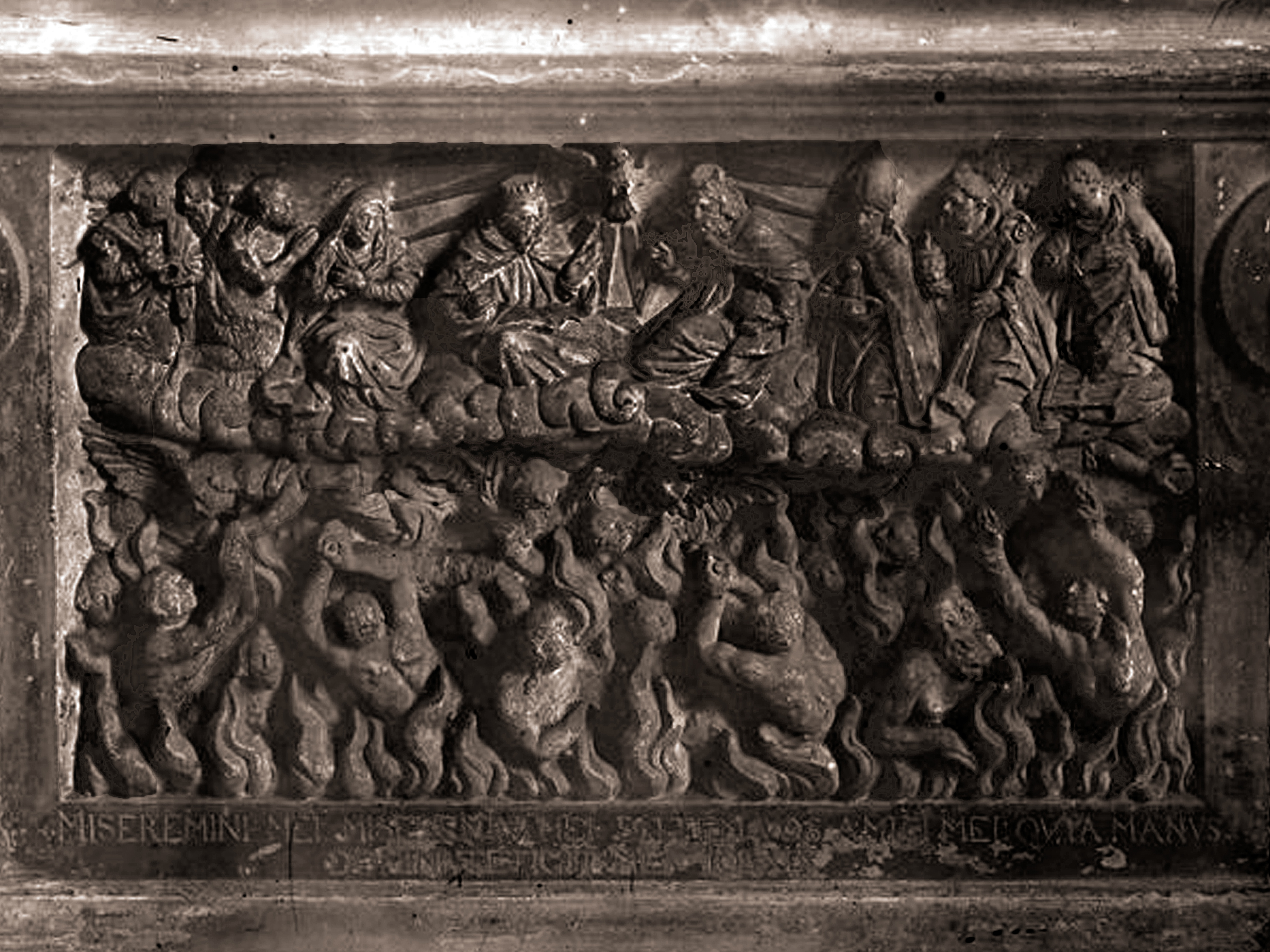 Надгробный памятник семейства графов Эльтерсхофен